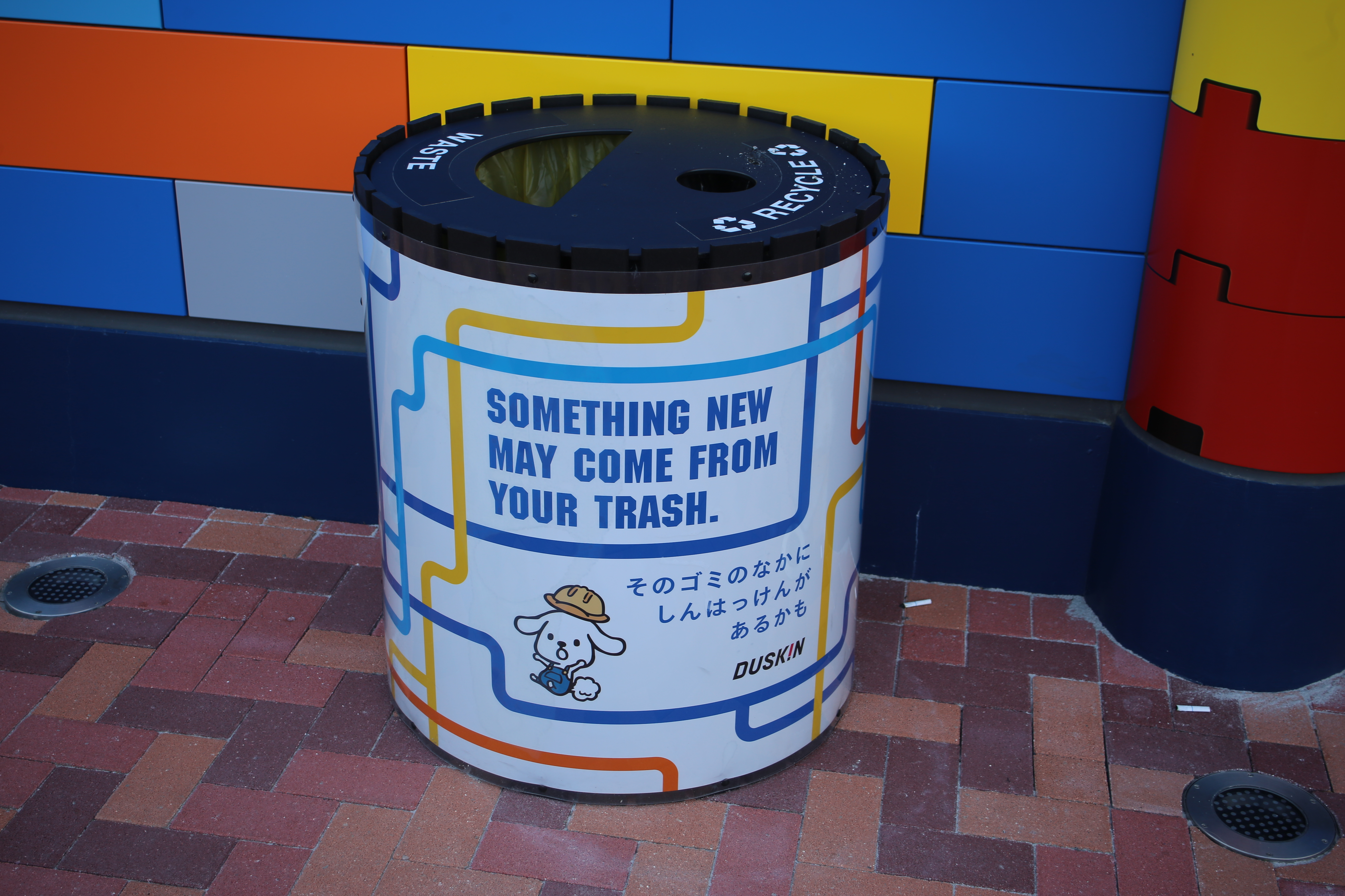 名古屋市港区金城ふ頭のレゴランド・ジャパンに設置されているオフィシャルマーケティングパートナー ダスキンによるダス犬のゴミ箱